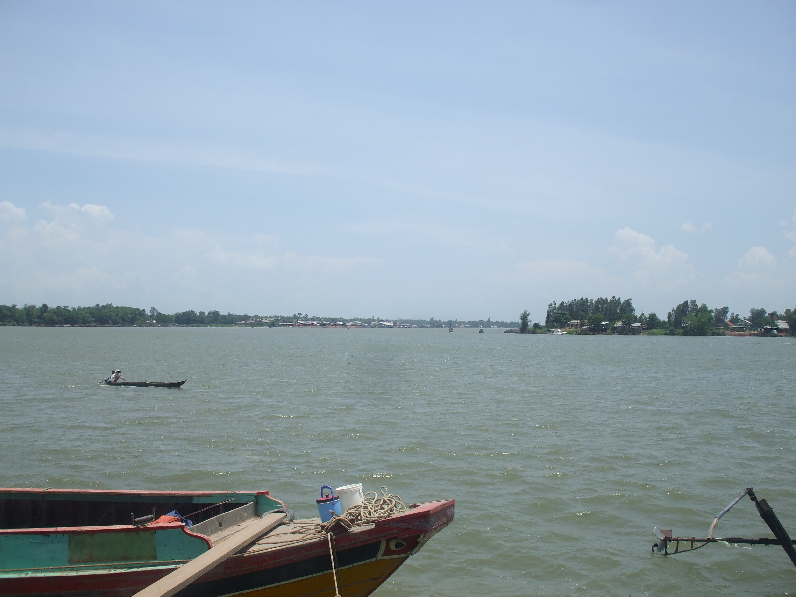 Sông Vàm Nao ở An Giang (Việt Nam).